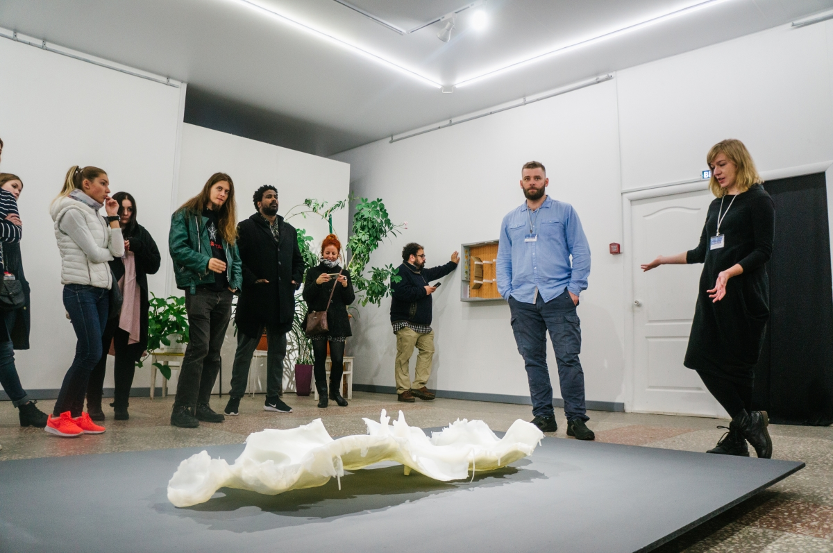 Arctic Art Forum 2016. Кураторская экскурсия. Проект “Возвращение красной армии” Кураторы Иван Галузин и Глафира Северьянова. В Выставочном зале союза художников (Архангельск)